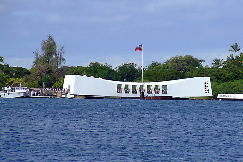 Le mémorial de Pearl Harbour